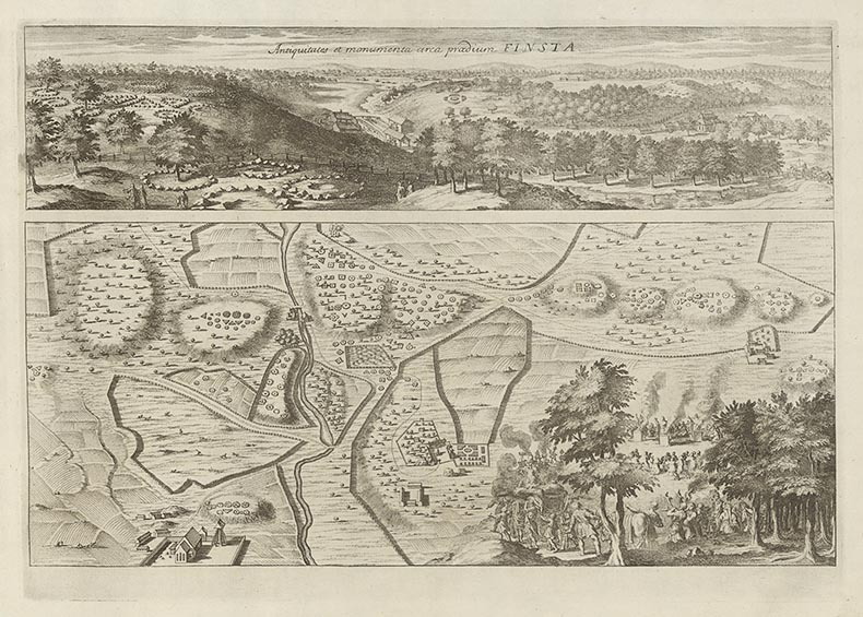 Titel i översättning Forntida minnesmärken i Finstatrakten